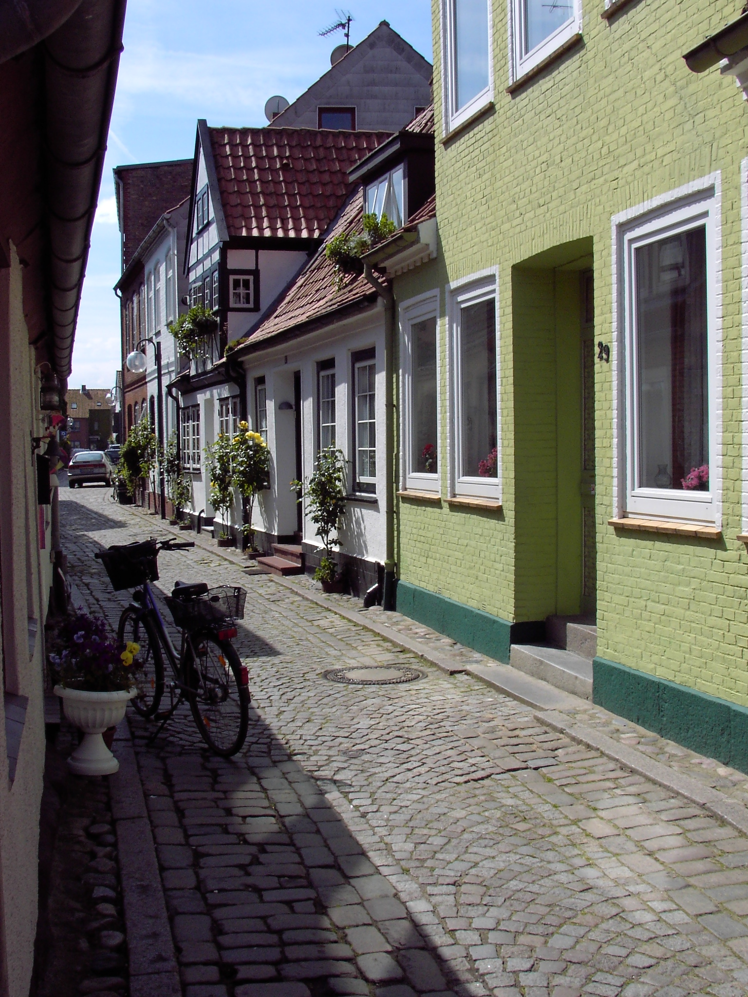 Eckernförde: Old city centre